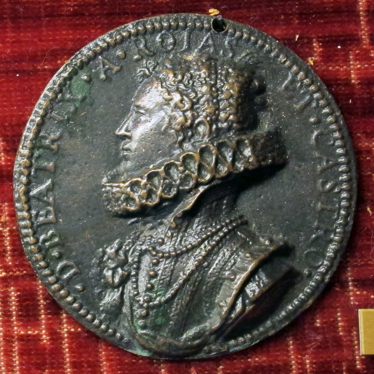 medaglia, vedi titolo